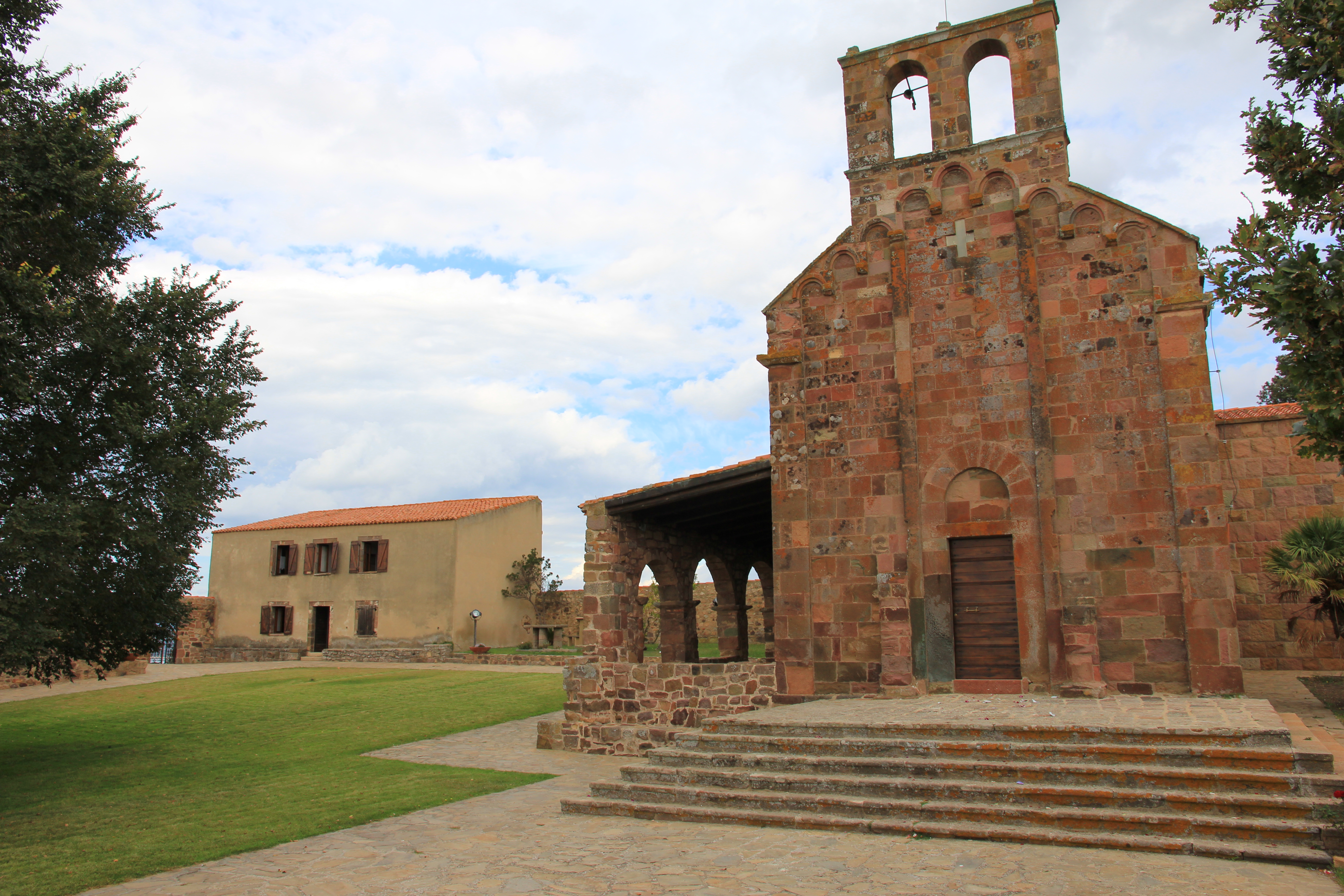 Oschiri - Santuario di Nostra Signora di Castro